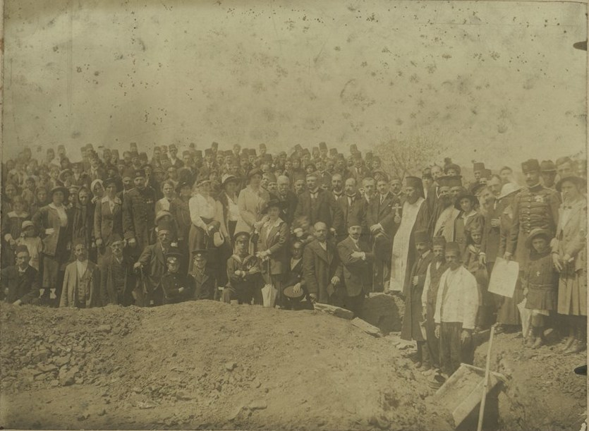 Групова снимка при поставяне основите на църквата „Св. Димитър“ в кв. Ферикьой (Цариград).